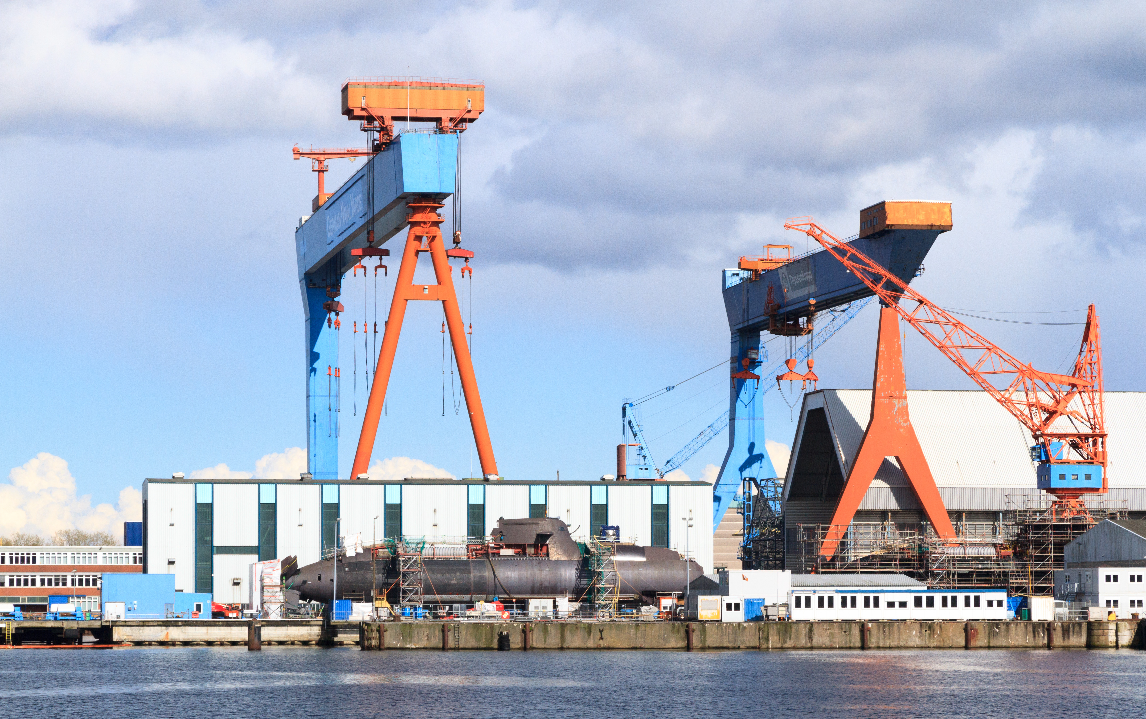 Howaldtswerke-Deutsche Werft